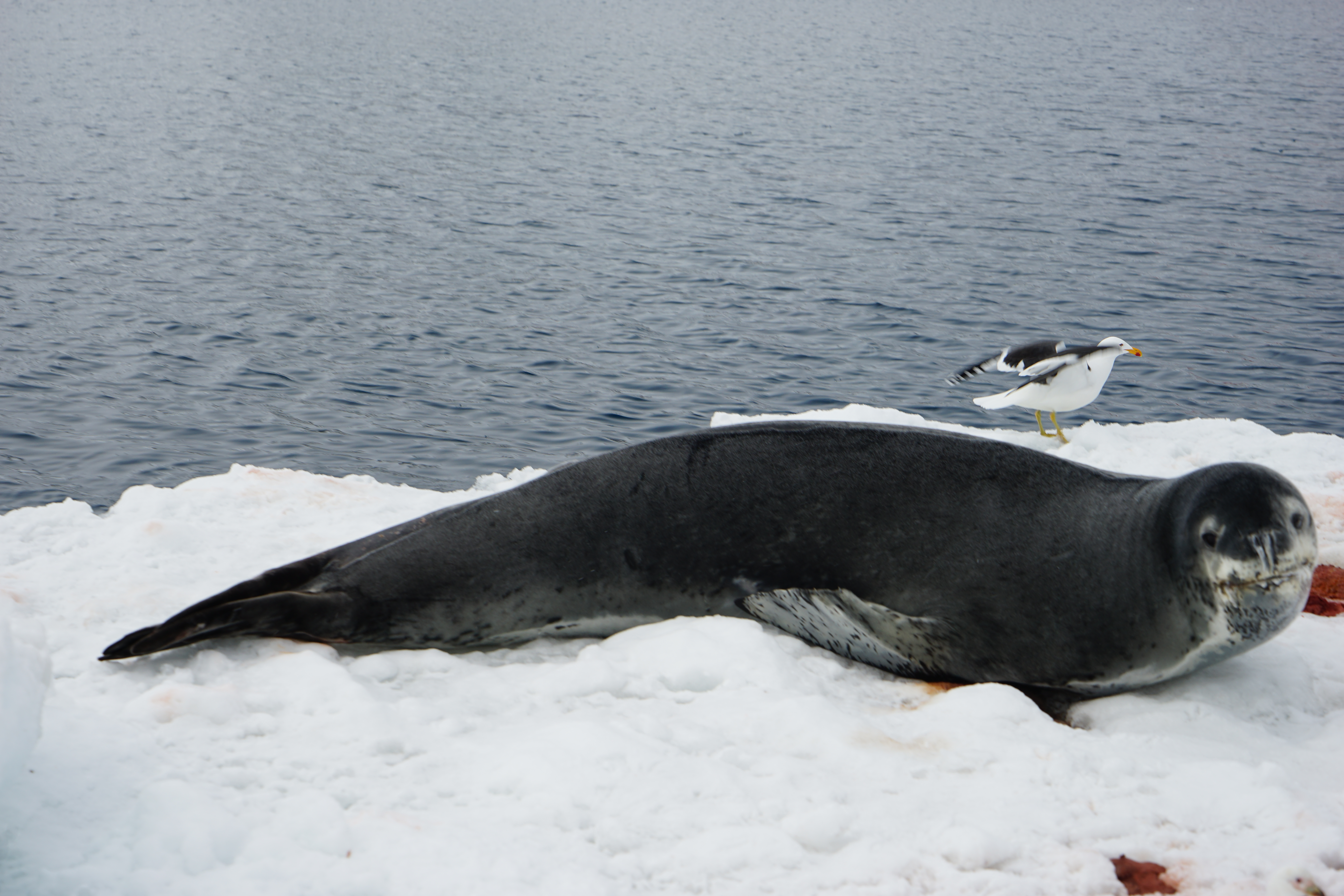 남극 킹조지섬에 위치한 세종과학기지 인근에서 2016년 10월 10일 촬영된 Hydrurga leptonyx (얼룩무늬물범) 사진